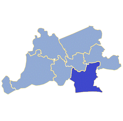 Powiat gorzowski - Gmina Deszczno